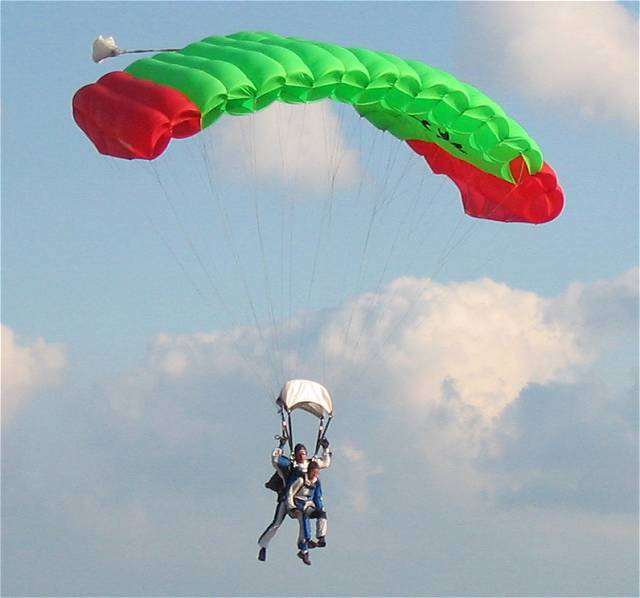 Flug an einem Tandem-Fallschirm, Flugplatz Windelsbleiche, Bielefeld